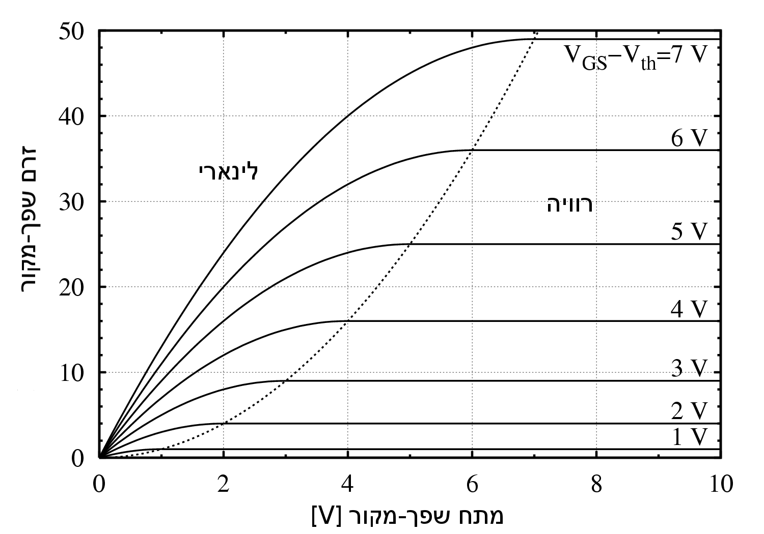 מצבי הפעולה של טרנזיסטור MOSFET